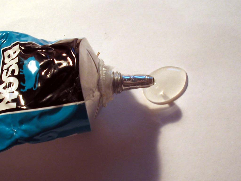 lijmdruppel uit tube lijm